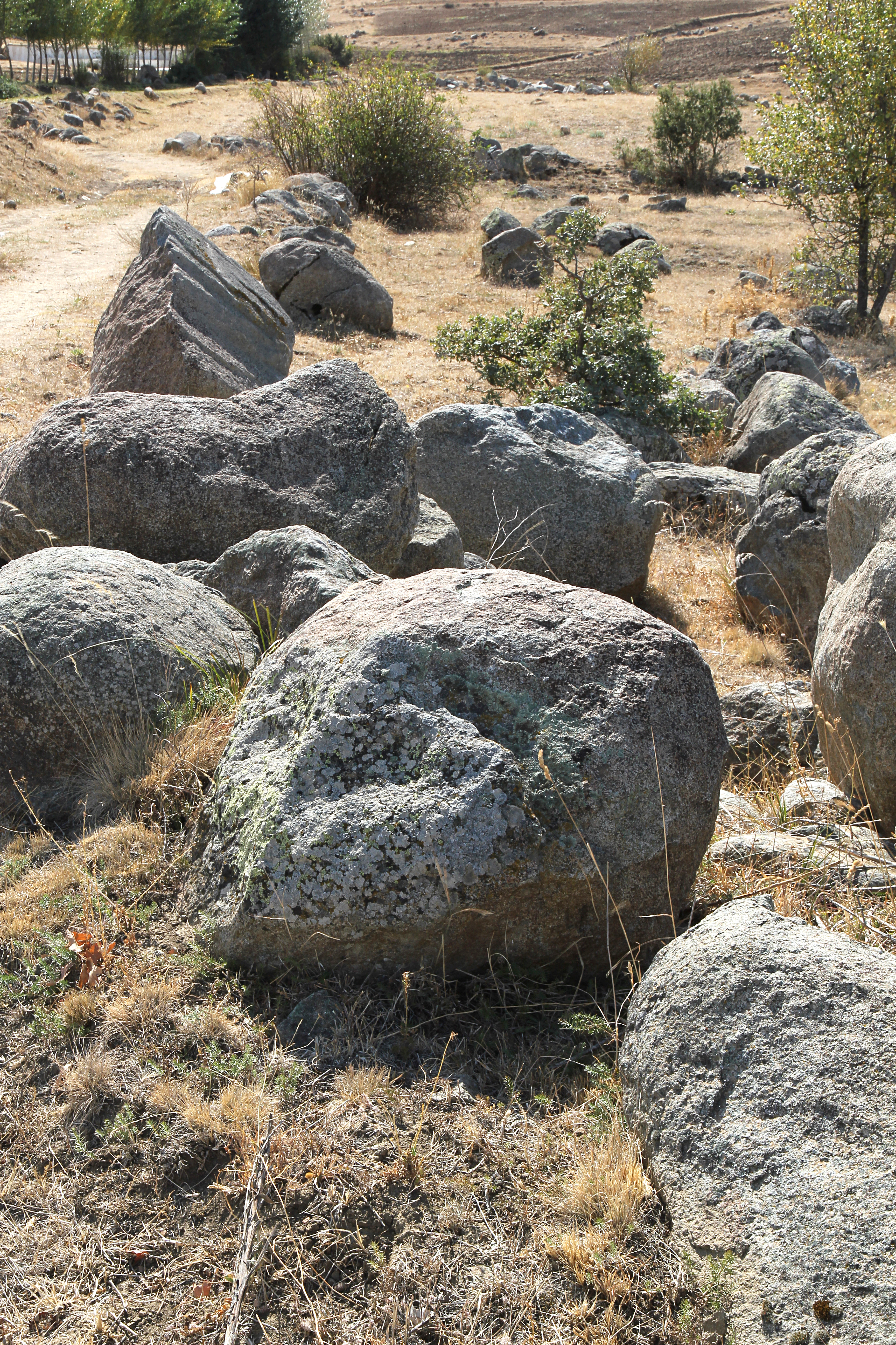 Hethitischer Steinbruch und Bildhauerwerkstatt bei Karakız, Zentraltürkei